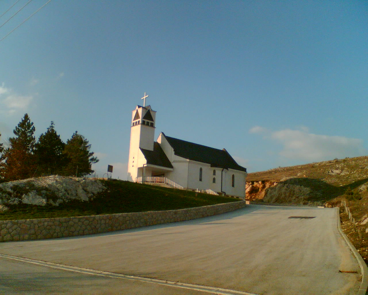 Crkva u Lugu